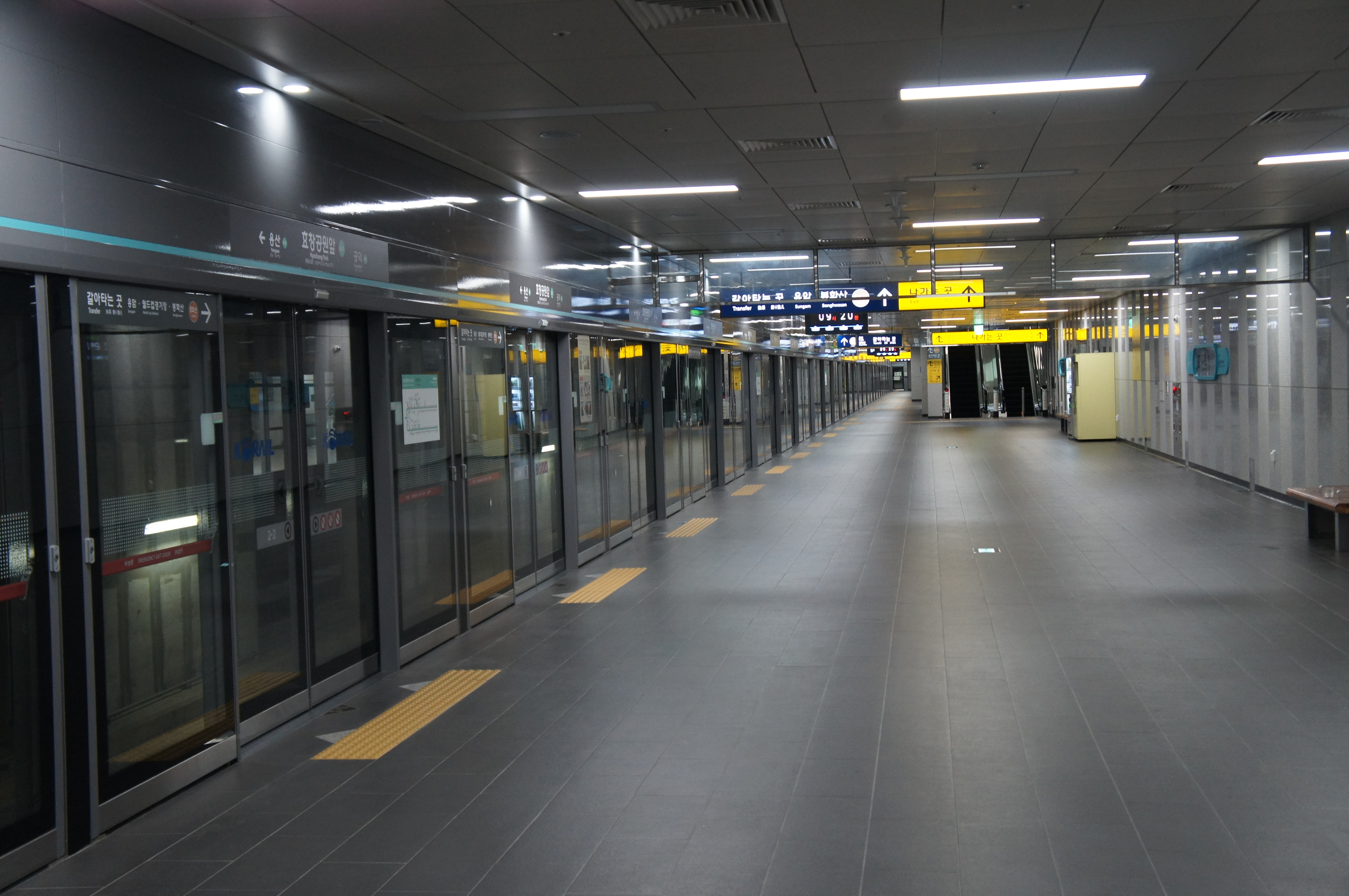 용산선 (경의중앙선) 효창공원앞역 승강장